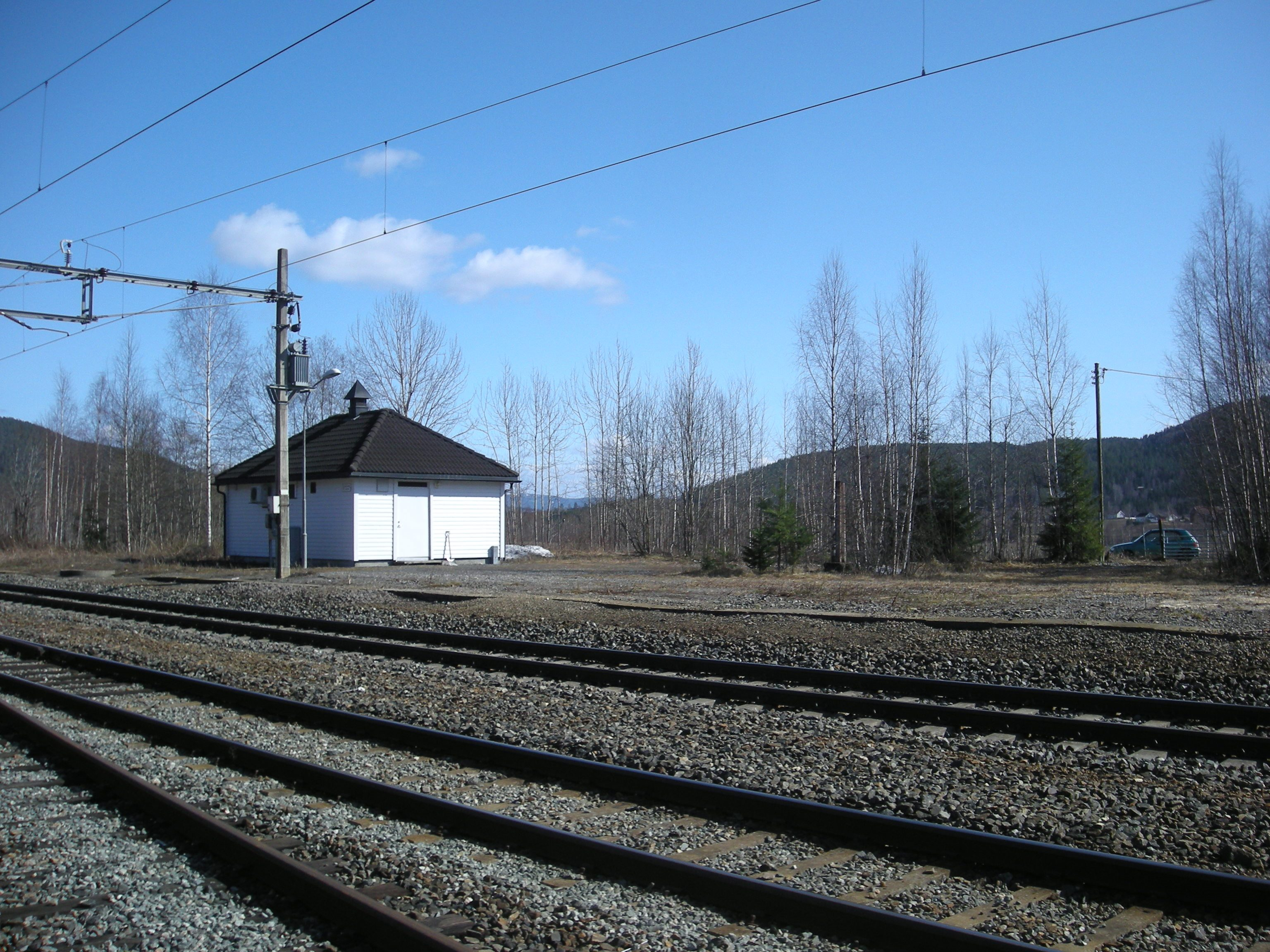 Veme stasjon på Bergensbanen